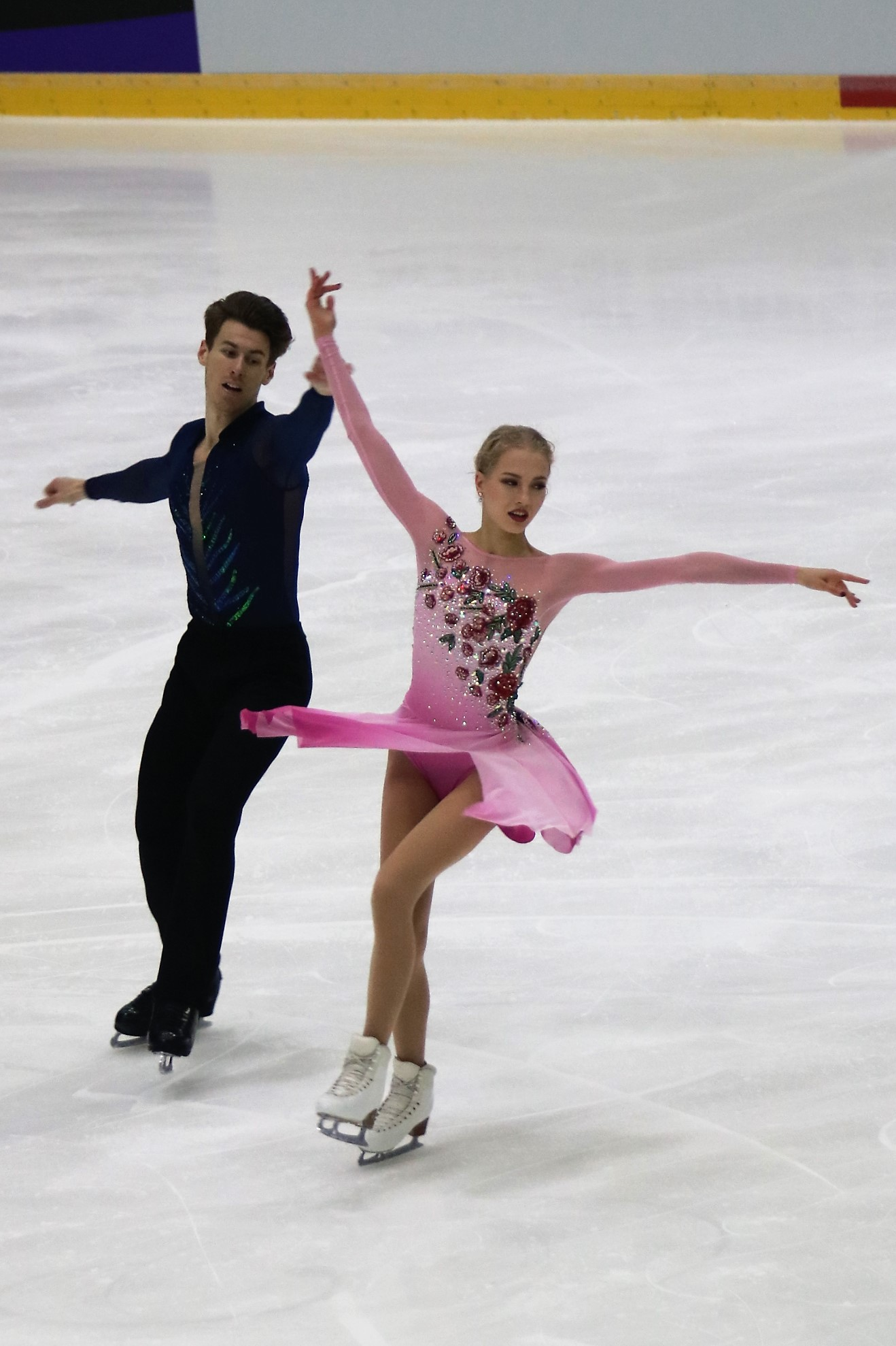 Юулия Турккила / Маттиас Верслуйс (Финляндия) на Гран-при Хельсинки 2018